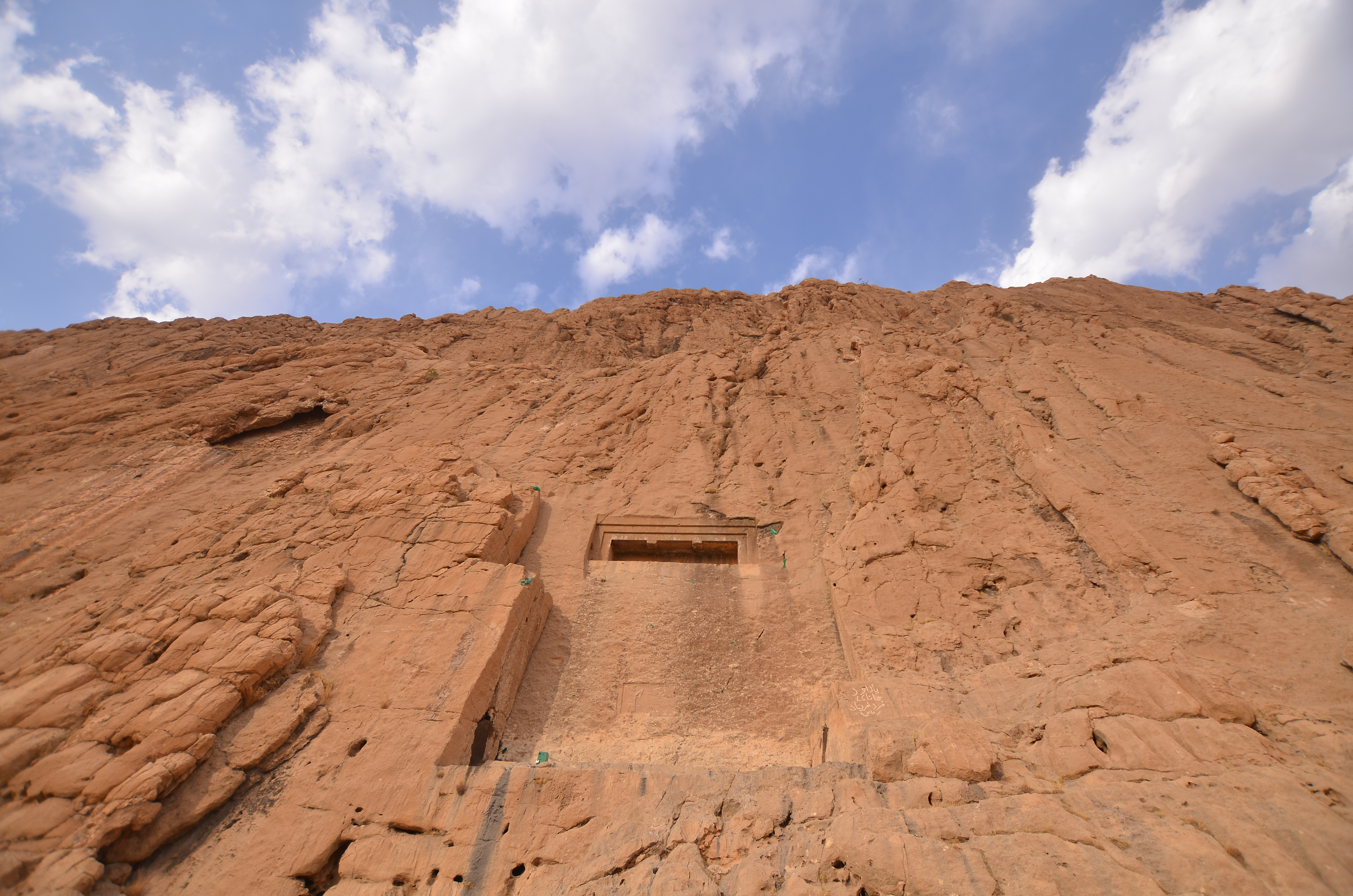 دکان داود (که ل داو) گوردخمه ای از دوران ماد در منطقۀ قلعه شاهین